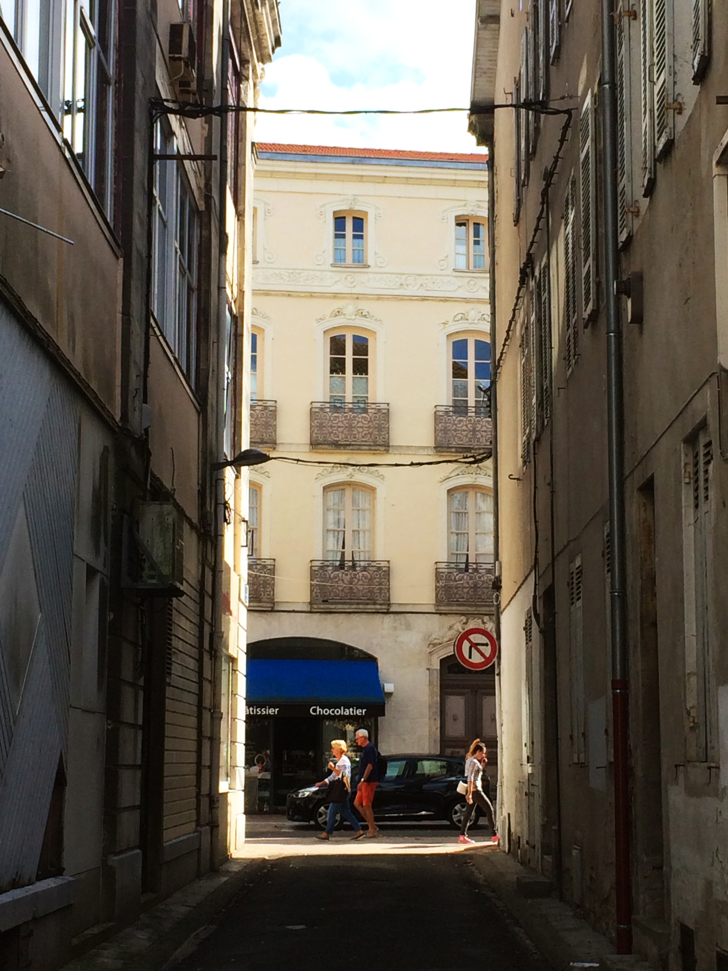 Rue des Archers, centre historique.